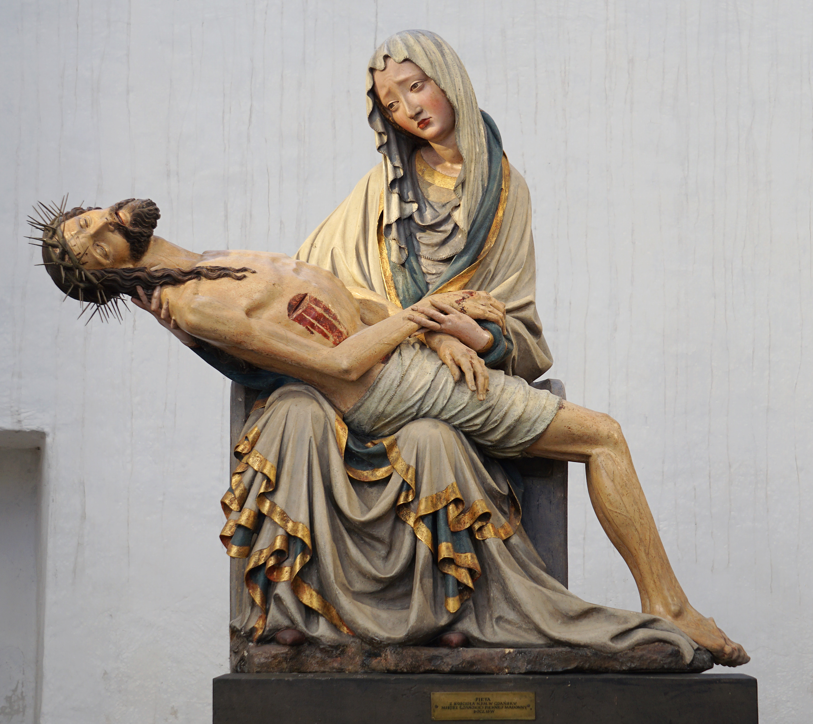 Pieta, pocz. XV w.